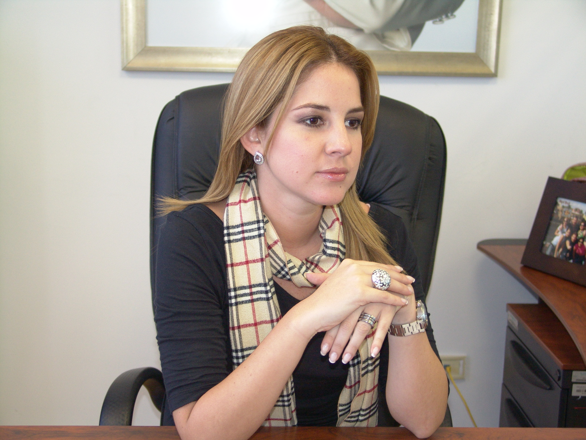 Comisión del Desarrollo Económico Productivo y la Microempresa 21 de Enero de 2010